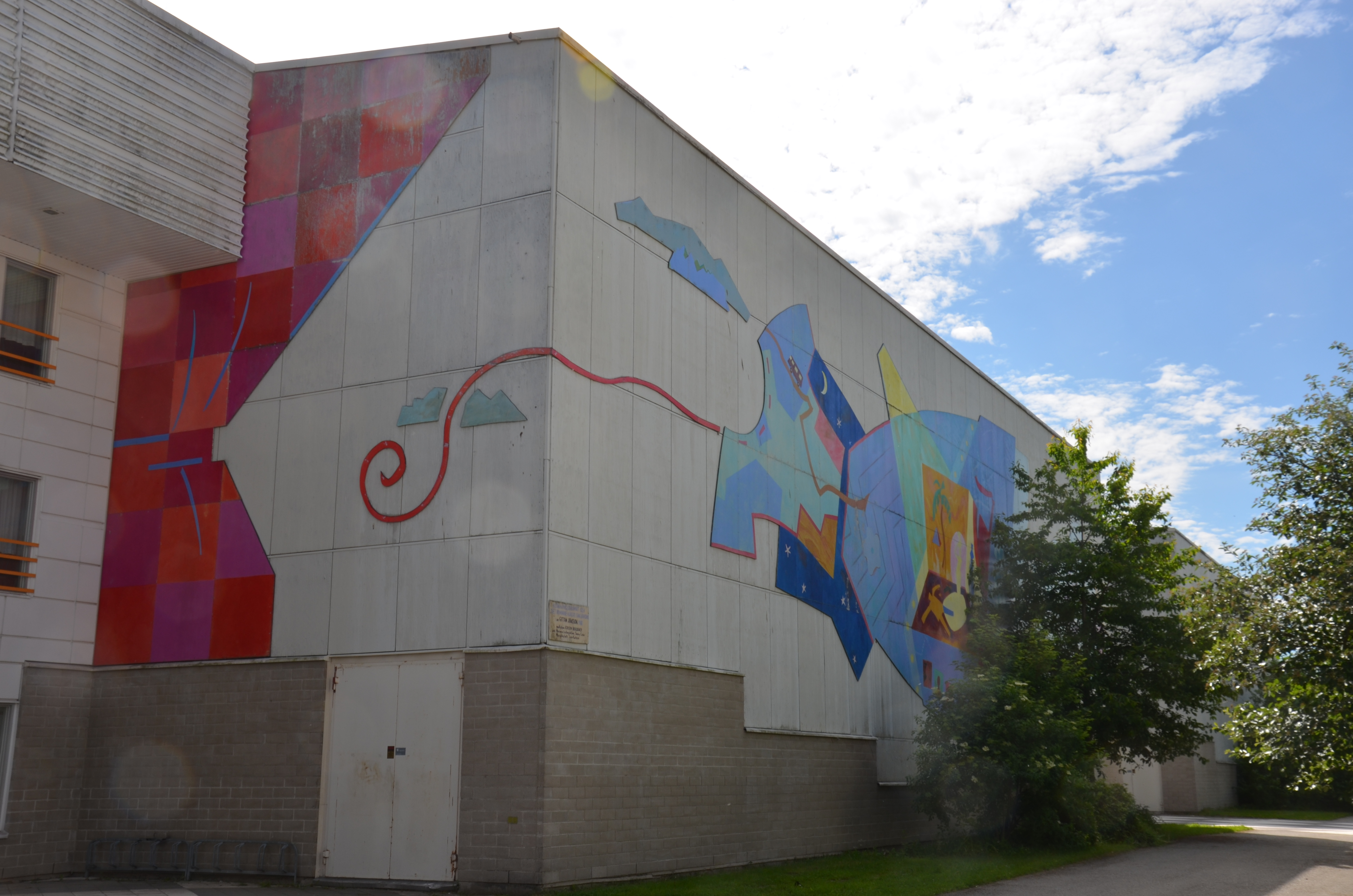 Gittan´Jönssons målning Klänningsdramat och det brinnande hjärtats gångjärnsdans på fasaden till Riksteatern i Botkyrka, Sverige